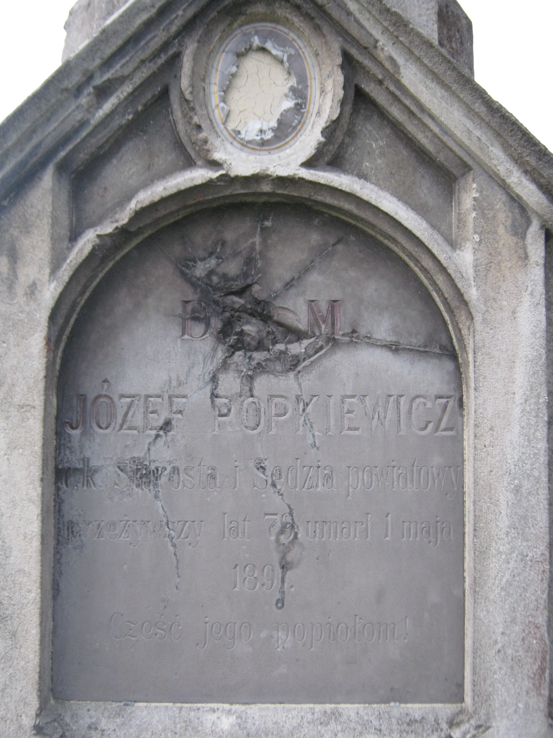 Таблиця з надписом на могилі старости Юзефа Попкевича, Бучач, 2016.